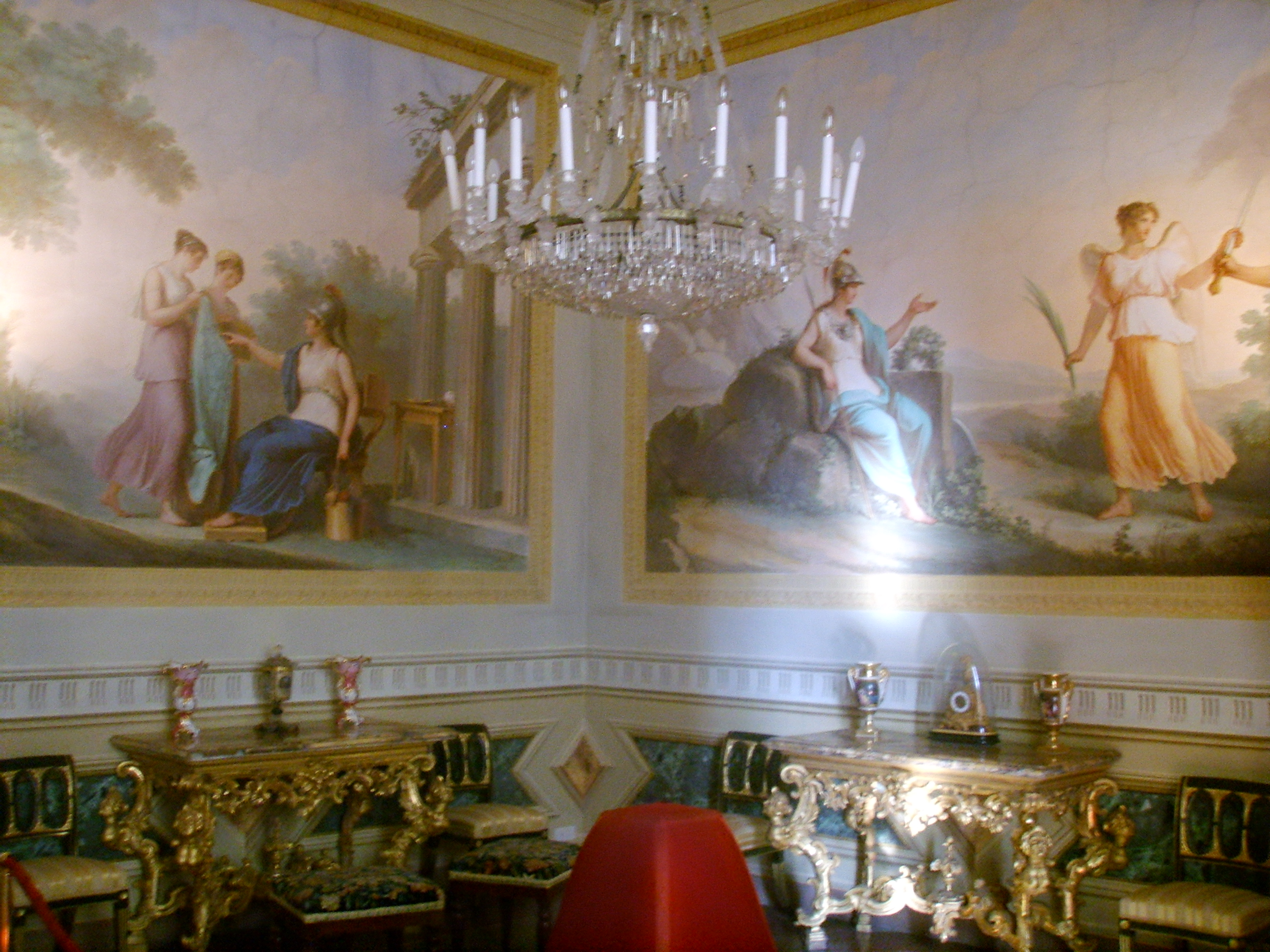 Villa medicea di Poggio a Caiano, inside entrance hall on the first floor in Poggio a Caiano, Italy